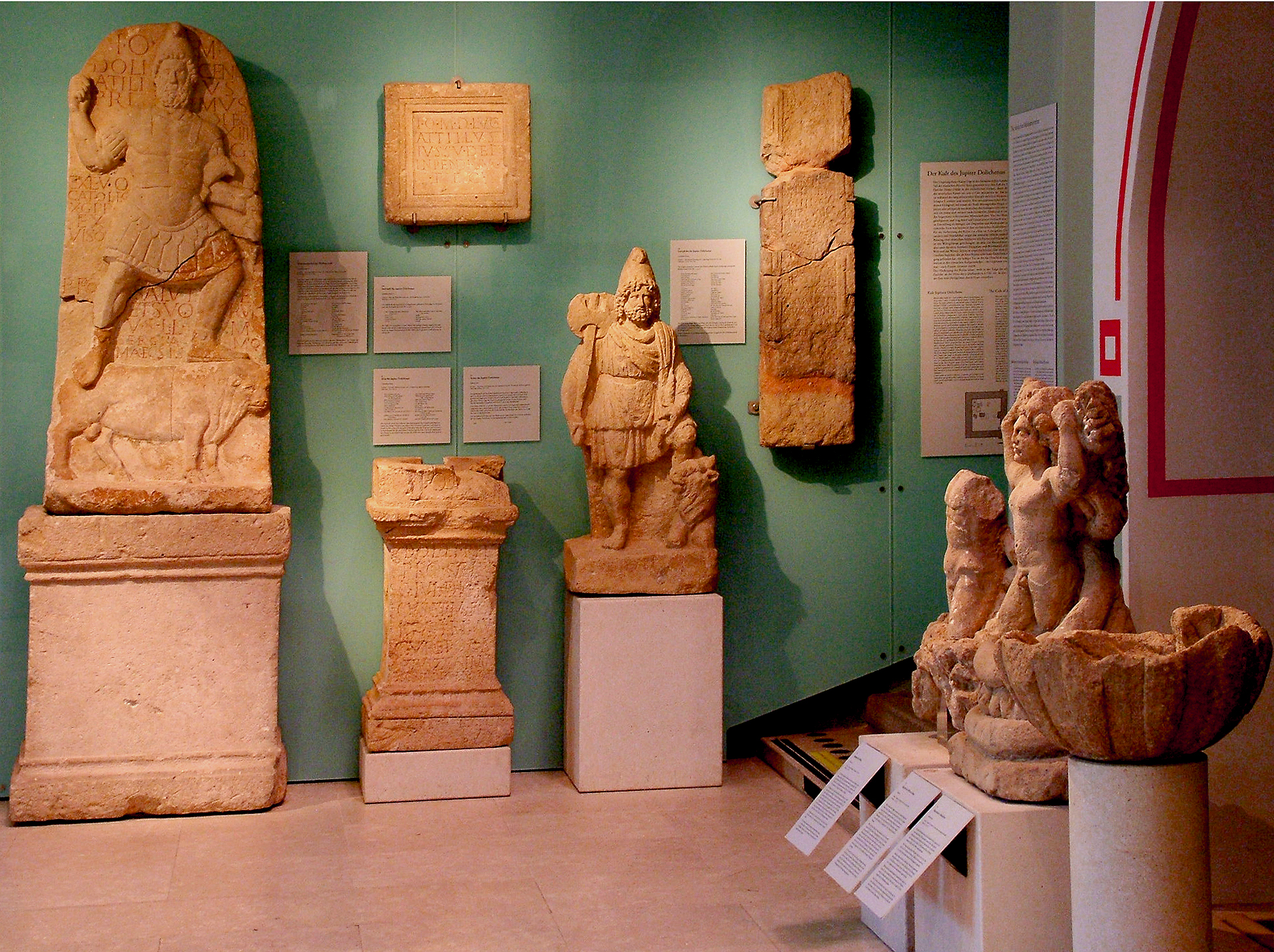 A Régészeti Múzeum (Museum Carnuntinum) fogadócsarnoka (Bad Deutsch Altenburg, Ausztria)